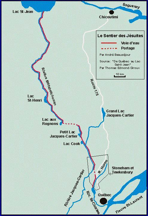 Sentier parcouru par les pères Jésuites entre Québec et le Lac St-Jean